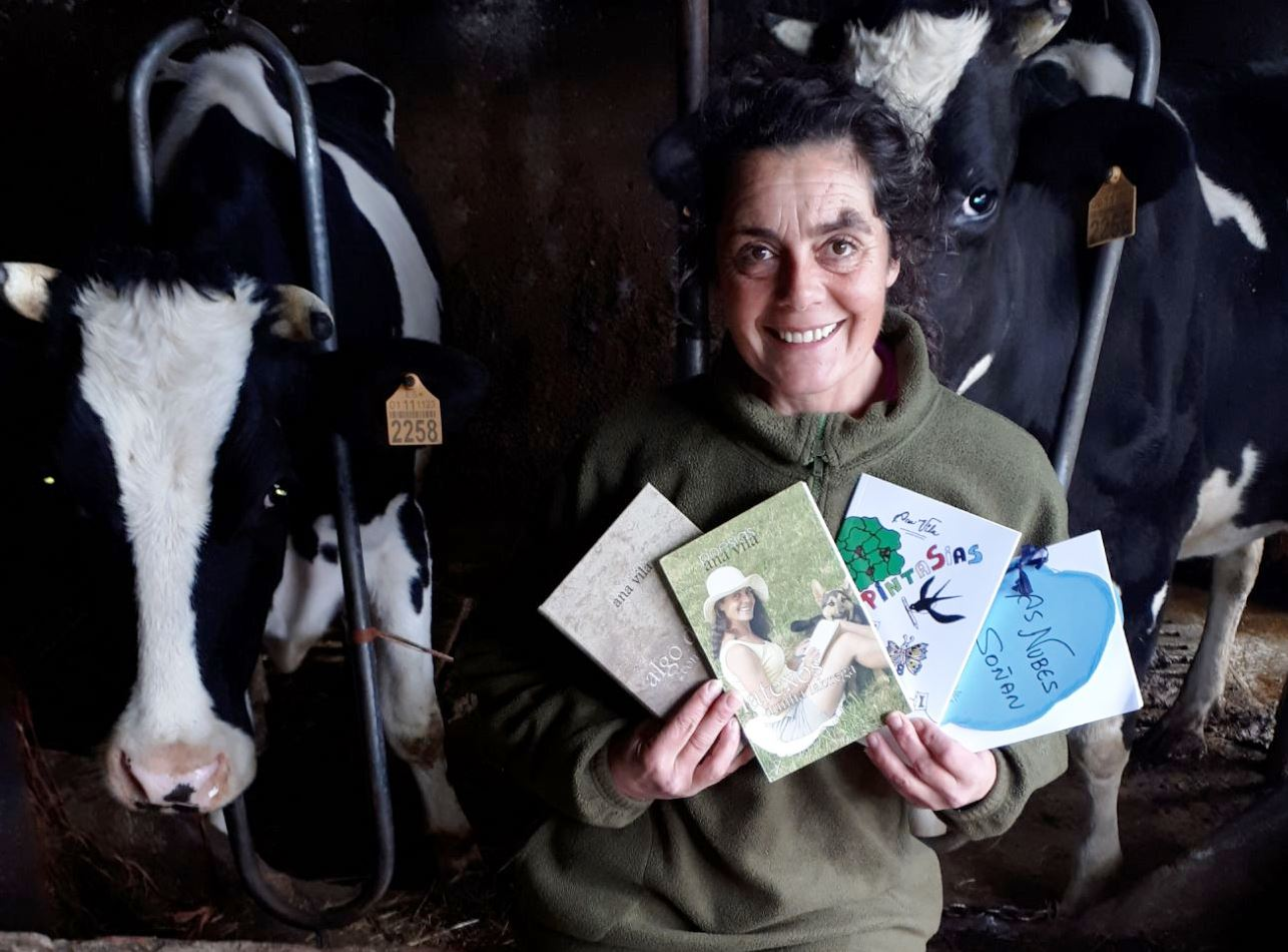 Ana Vila Portomeñe, escritora galega